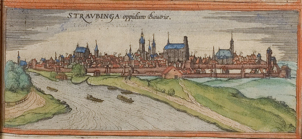 Straubing